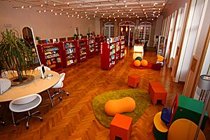 Sprachen Mediathek Meran. Der Spiegelsaal von Innen